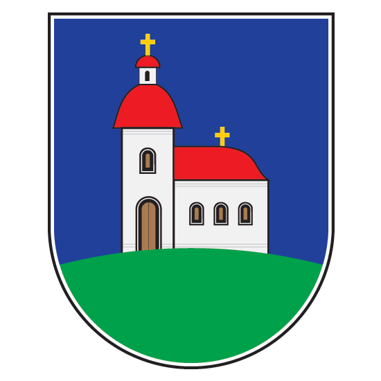 Blason de la ville de Bela Crkva en Serbie, Voïvodine